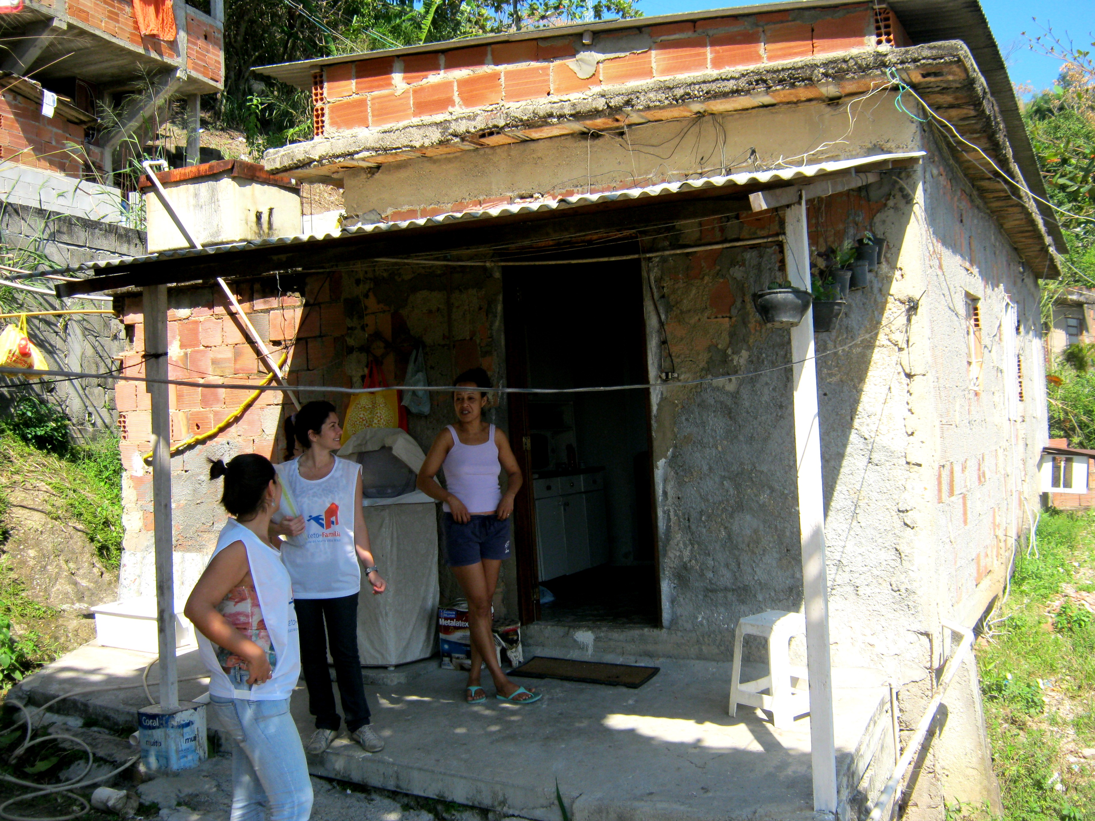 Visita a moradora, realizada pelas assistentes sociais do projeto para acompanhamento da família e identificar interesse de participação.